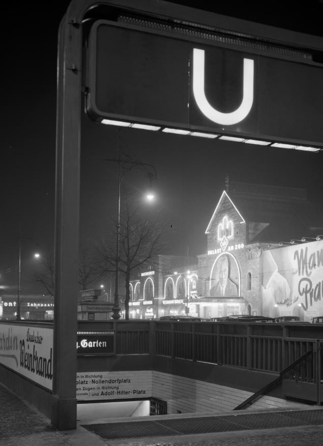 Berlijn. Nachtopname van de Hardenbergstrasse met een toegang tot de U-bahnhalte Zoologischer Garten en het feestelijk verlichte cafe-restaurant Wilhelmshallen met de Ufa-bioscoop Palast am Zoo. Nummer archiefinventaris: bekijk toegang 2.24.14.02 Bestanddeelnummer: 191-0463